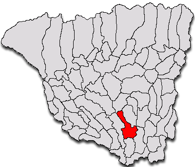 Categorie:Hărţi ale judeţului Gorj